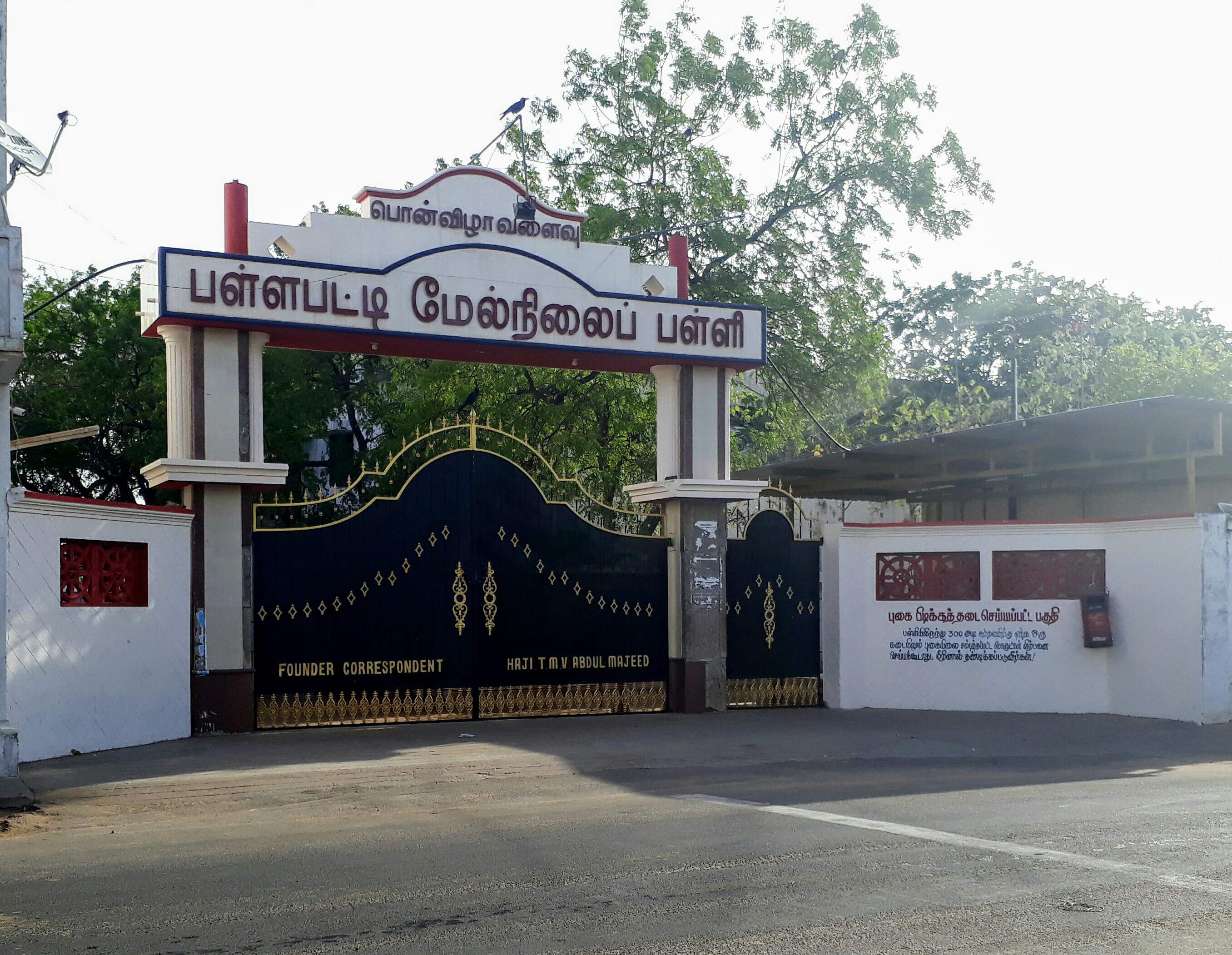 பள்ளபட்டி மேல்நிலைப் பள்ளியின் முகப்புத் தோற்றம்